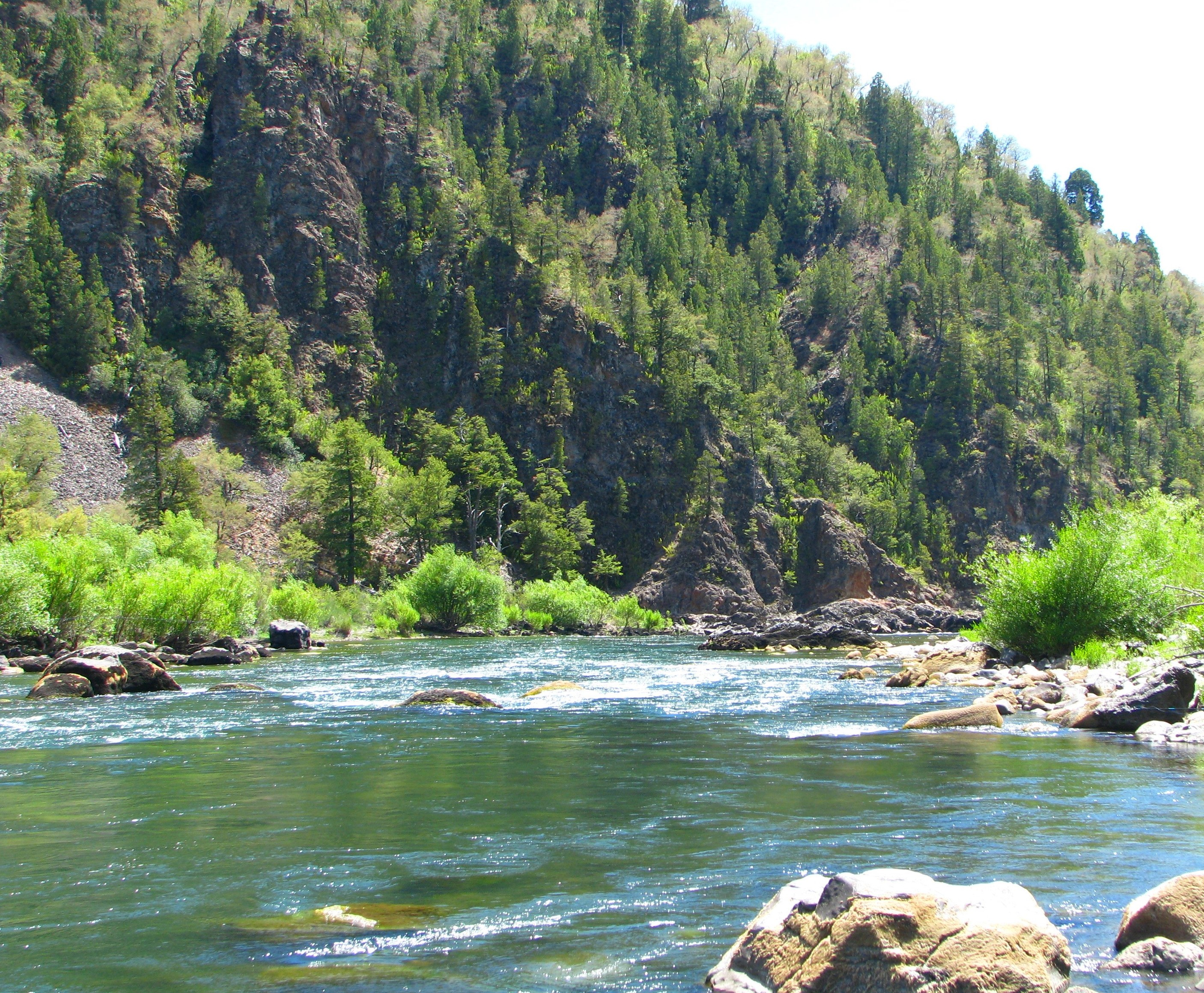 Río Biobío en comuna de Lonquimay